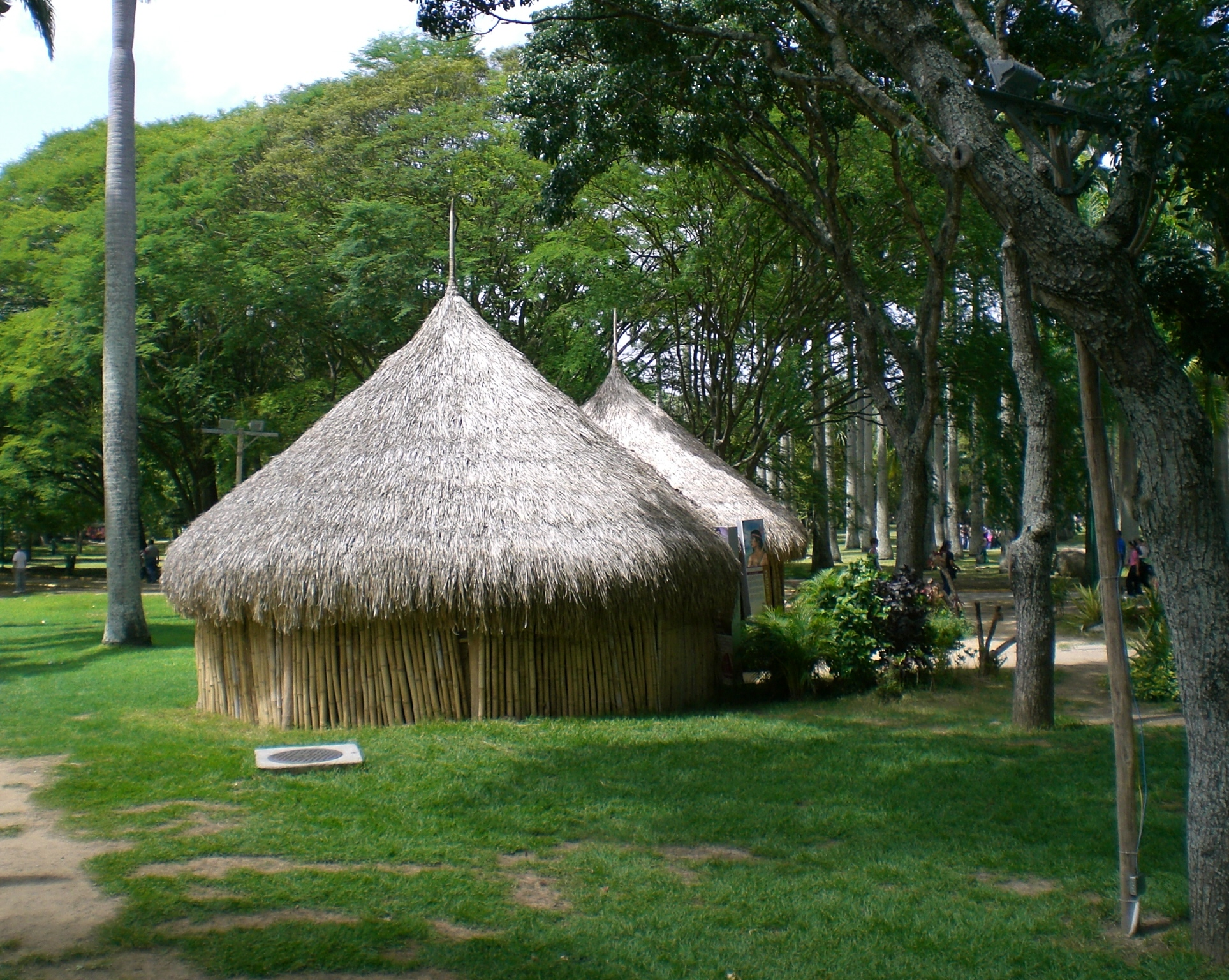 Churuata at Parque del Este, Caracas, Venezuela